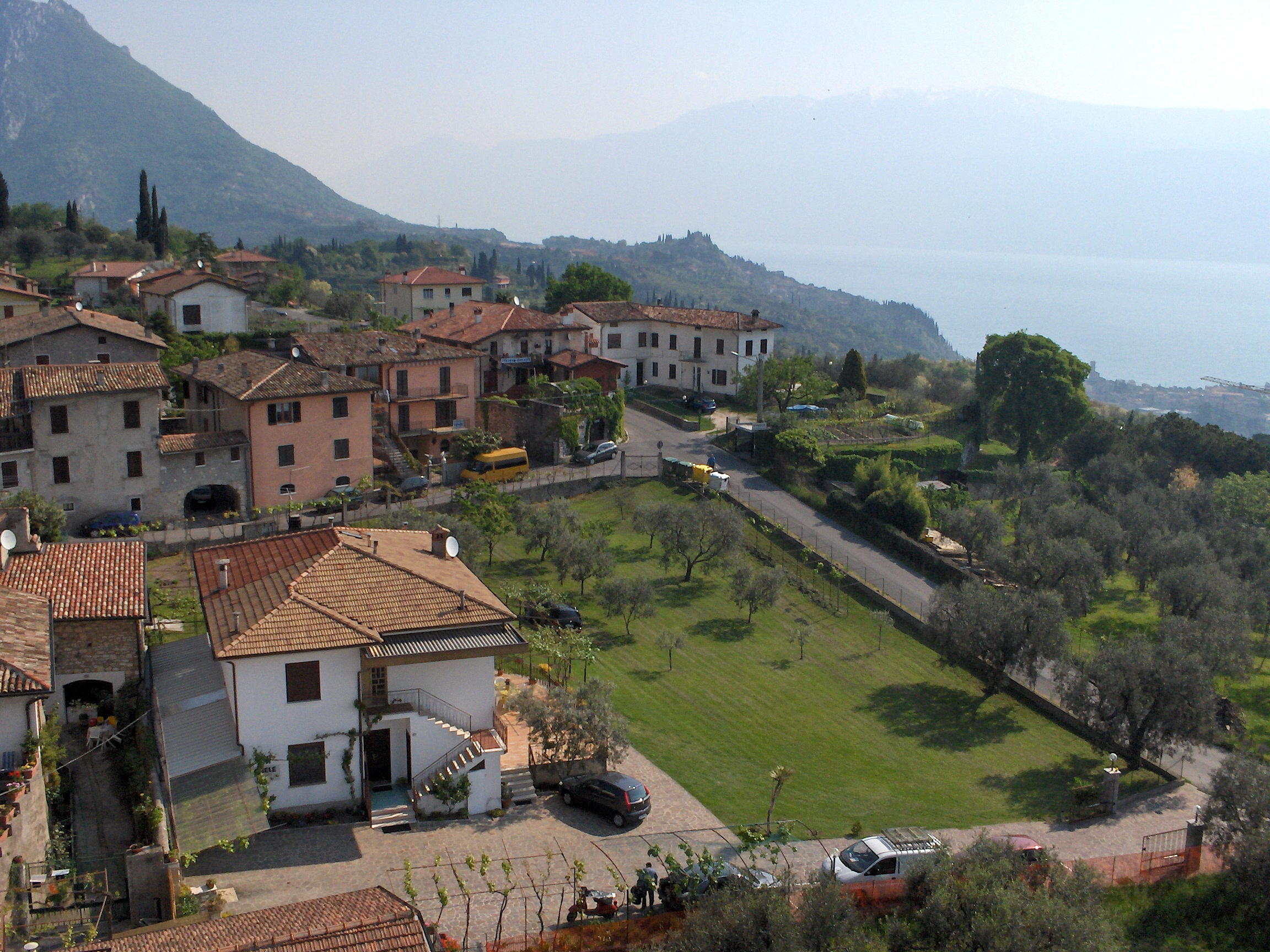 Vigole dall'alto